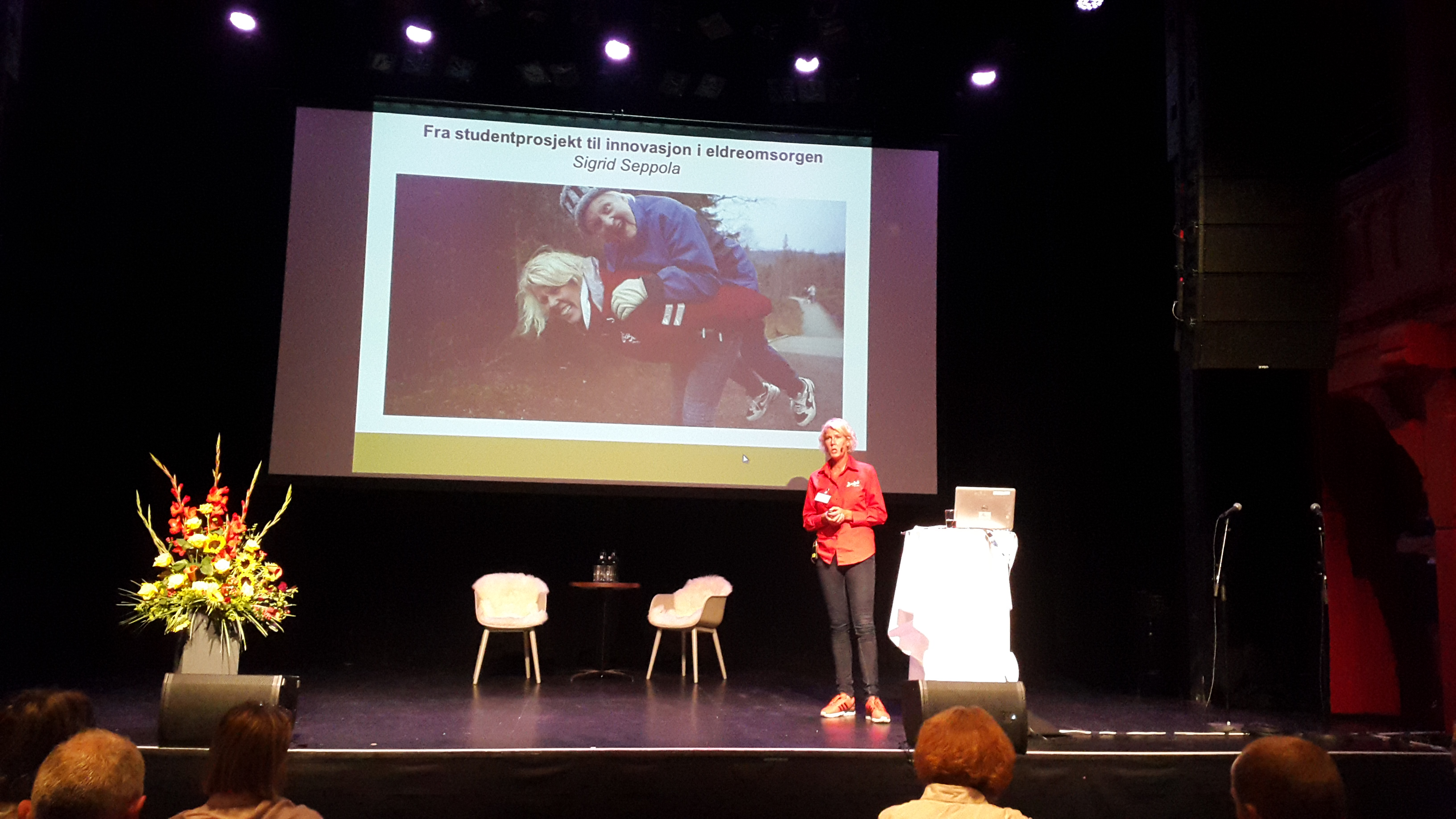 Sigrid Moum holder innlegg på Innomeds fagdag august 2015